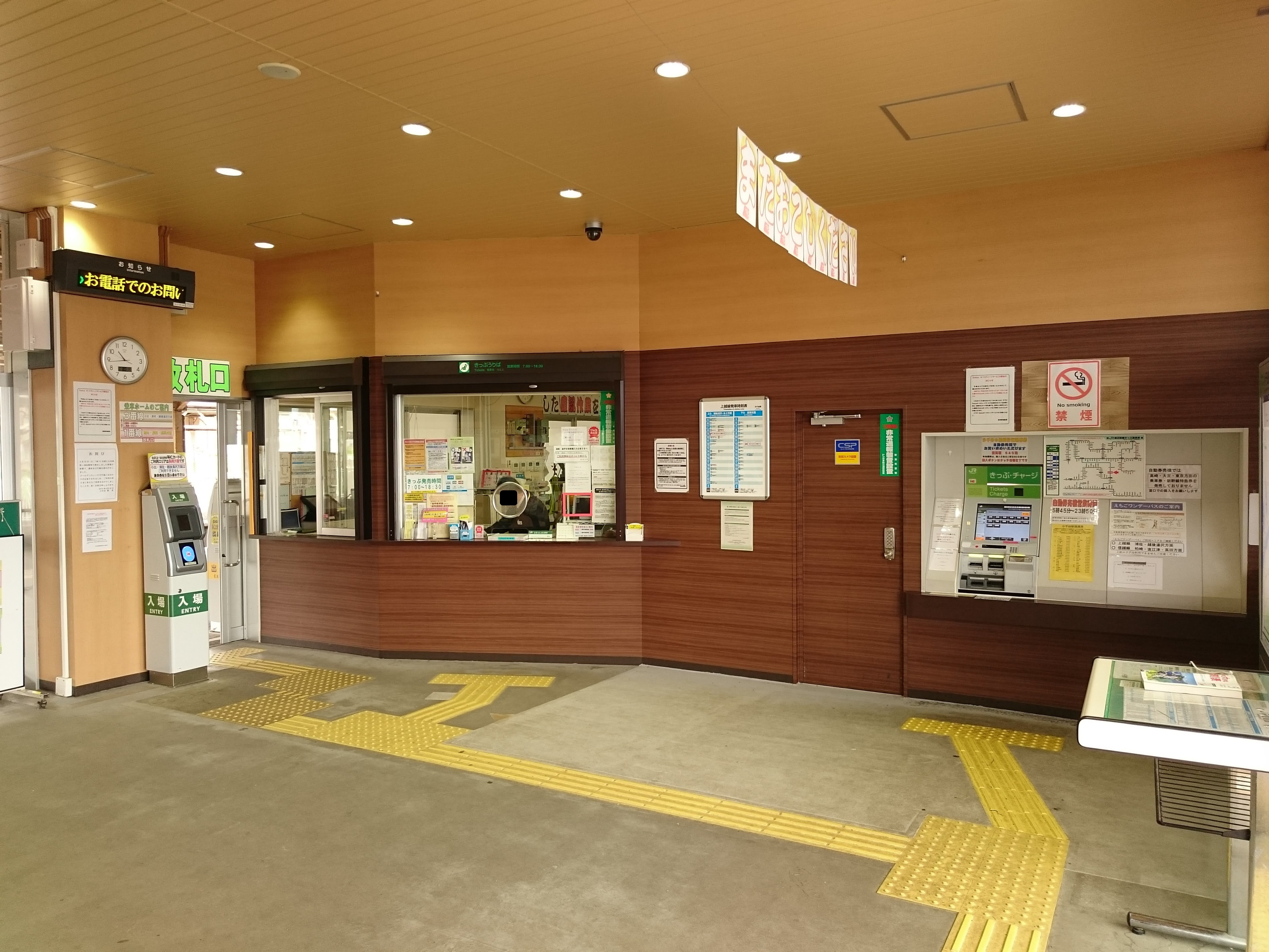 運行情報表示器設置後の小千谷駅コンコース（自動券売機の台数削減後）